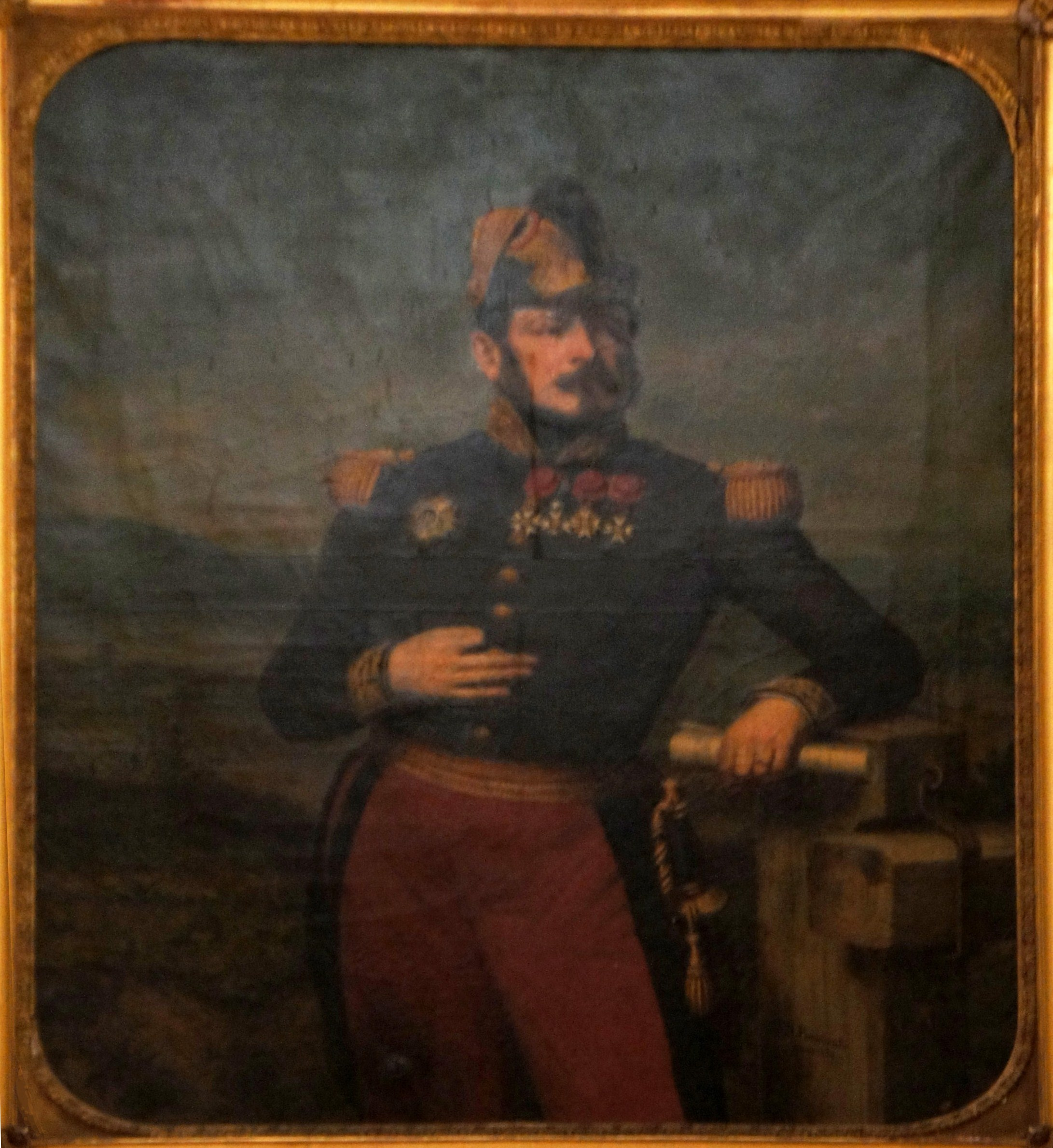 Le maire et général Parchappe peinture dans la mairie .